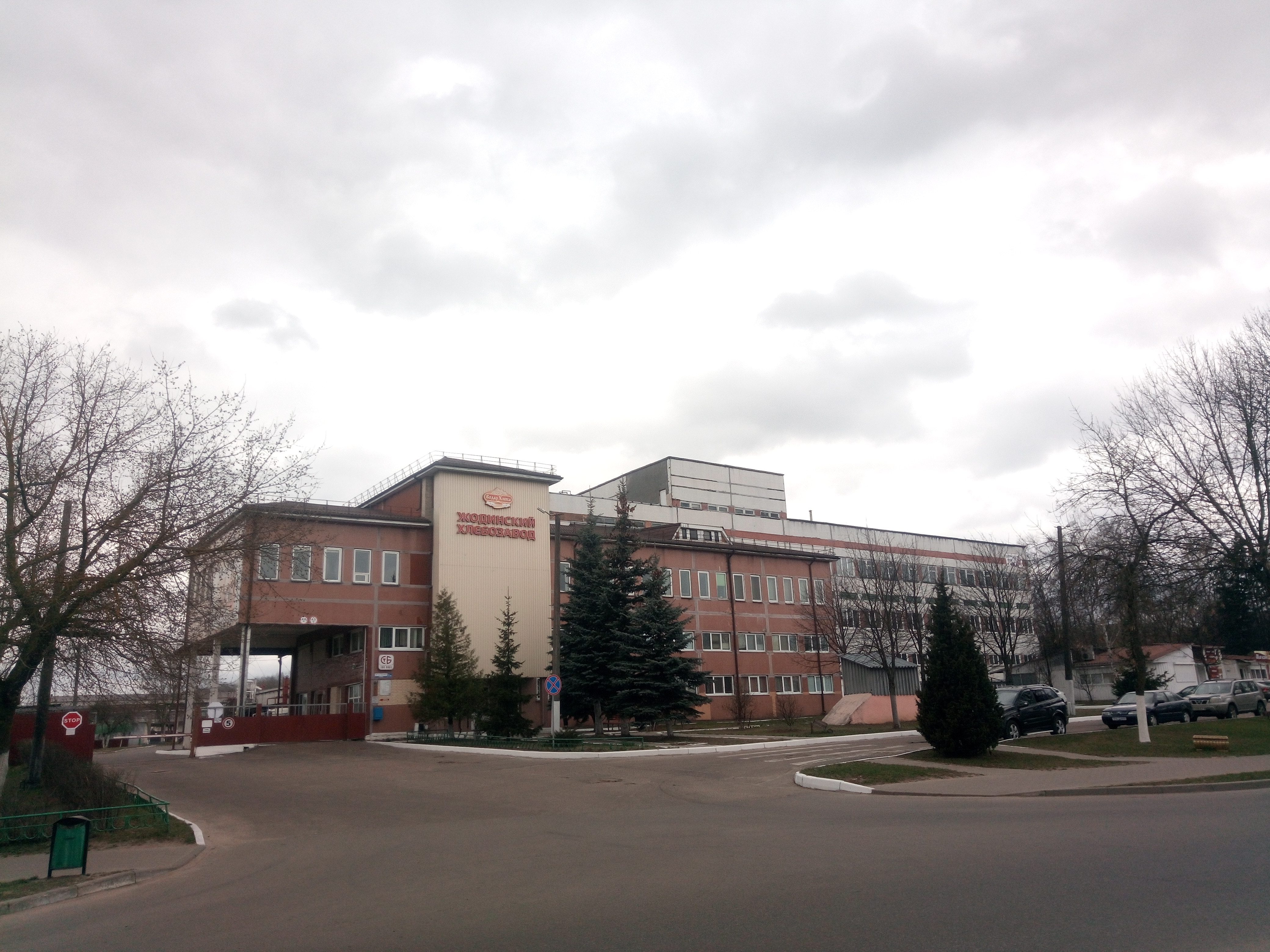 Філіял «Жодзінскі хлебазавод» ААТ «Барысаўхлебпрам».